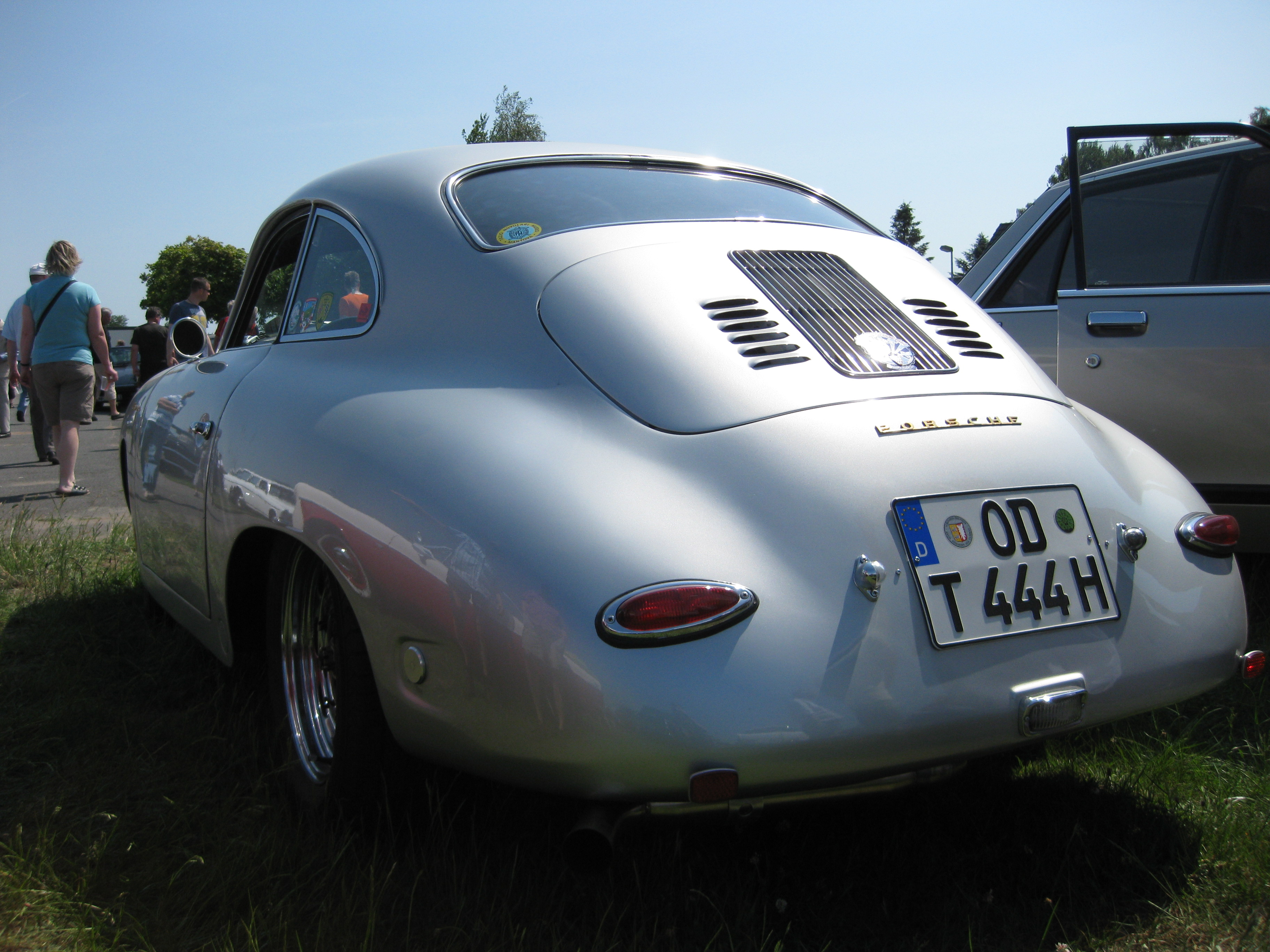 Porsche 356 A Heckansicht